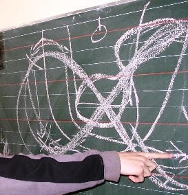 Zagrywka koszykarska przedstawiona w wersji teoretycznej na szkolnej tablicy.